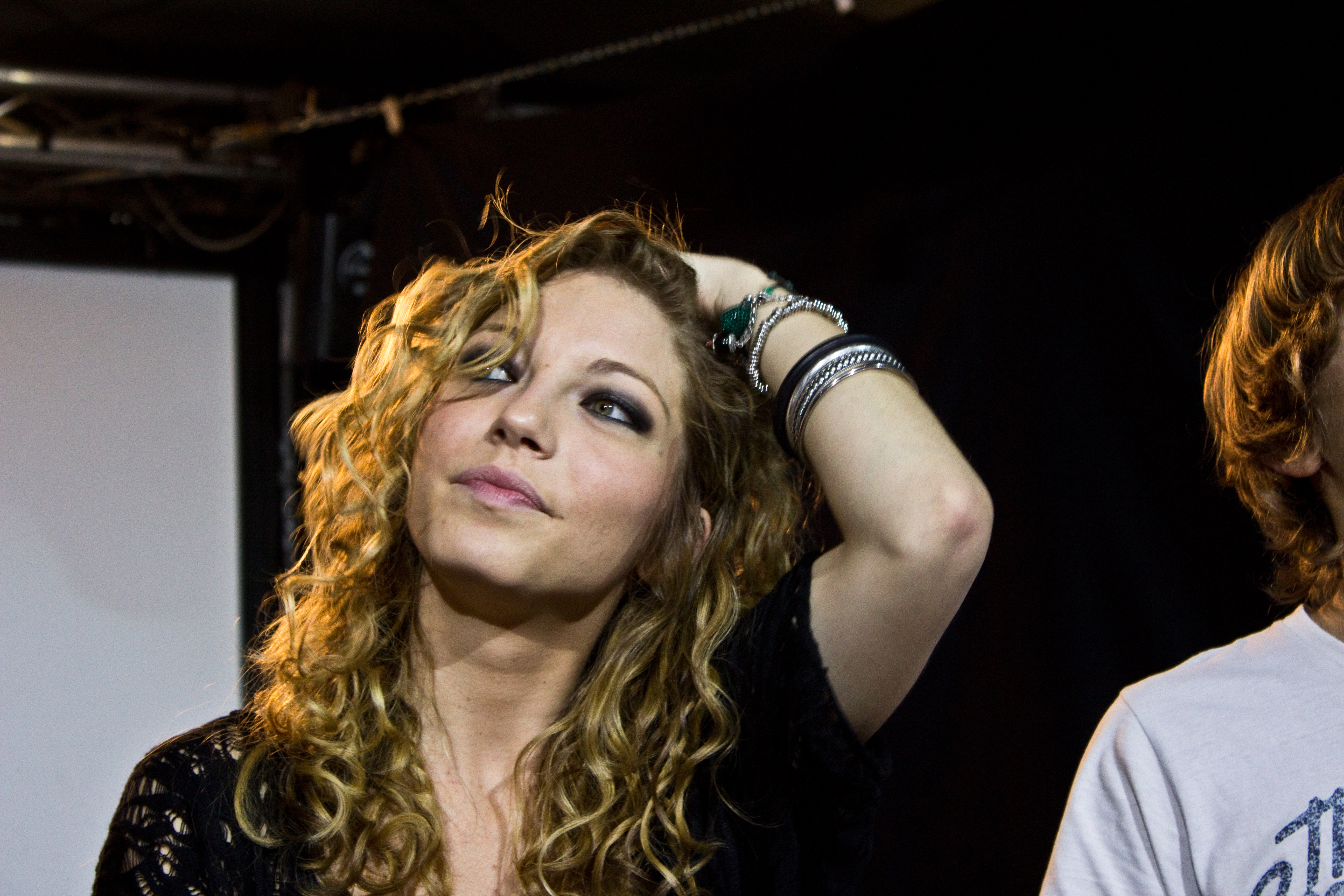 Secret Show di Freaks al Blackout di Roma. Nella foto Ilaria Giachi, che interpreta Giulia Croce.